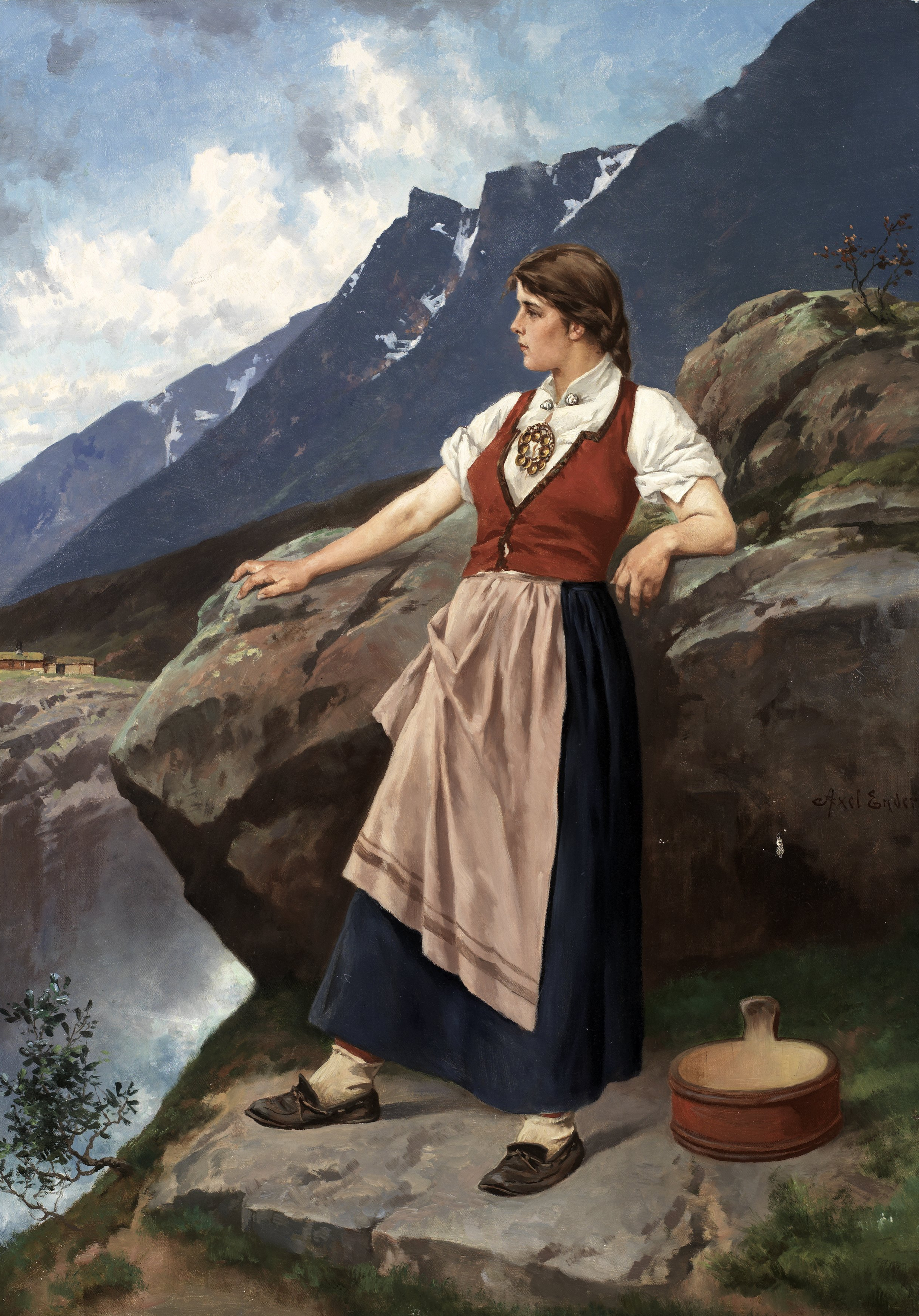 Norwegian: Kvinne ved utsiktpost